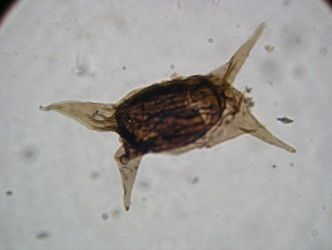 Exemple d'acritarche d'après Rubinstein in Rubinstein, Toro & Waisfeld, 1999 (photo C. Rubinstein)